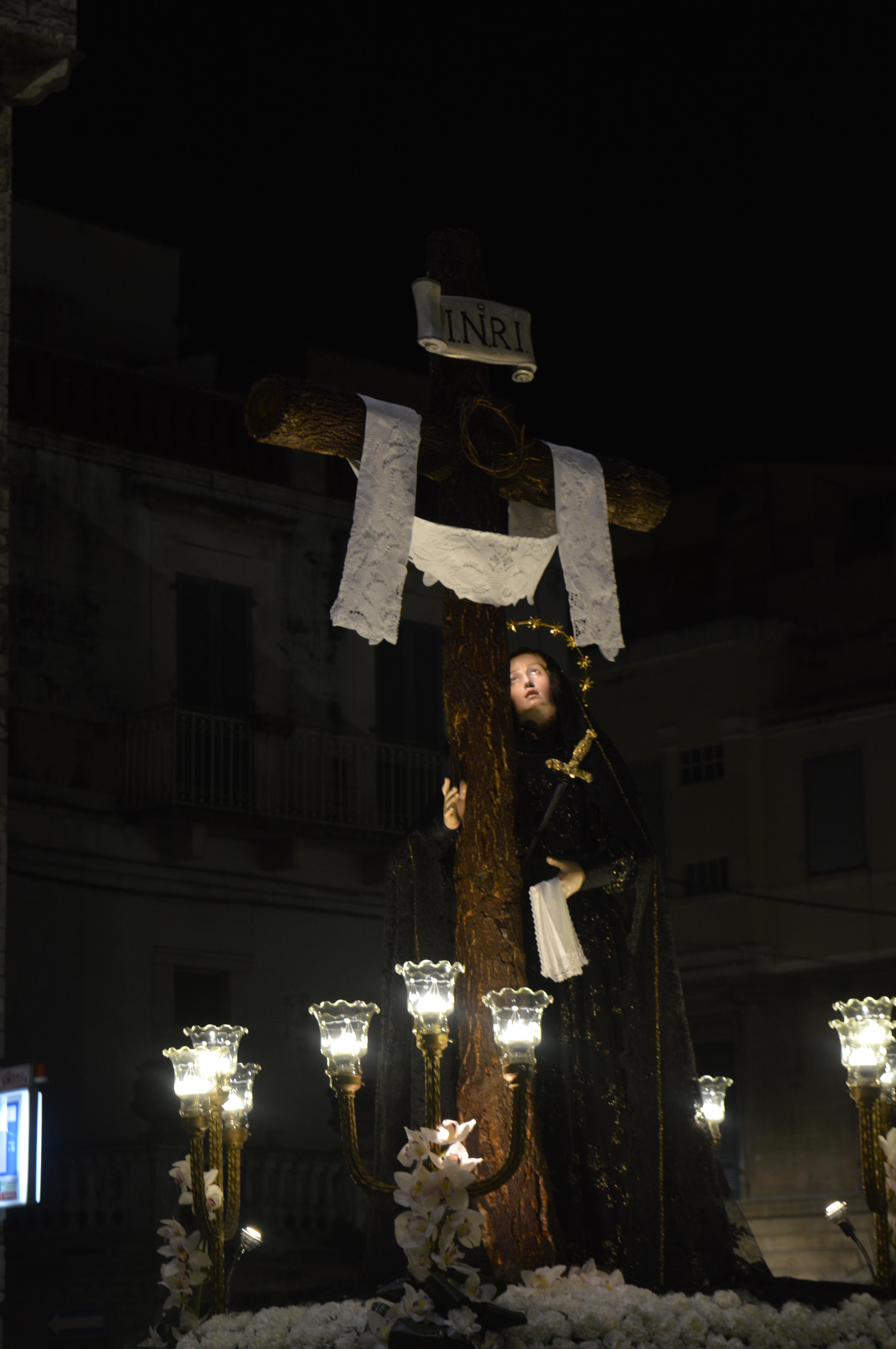 Desolata